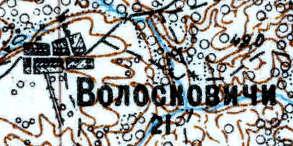 Топографическая карта Ленинградской области, квадрат VIc-28 (Луга), деревня Волосковичи